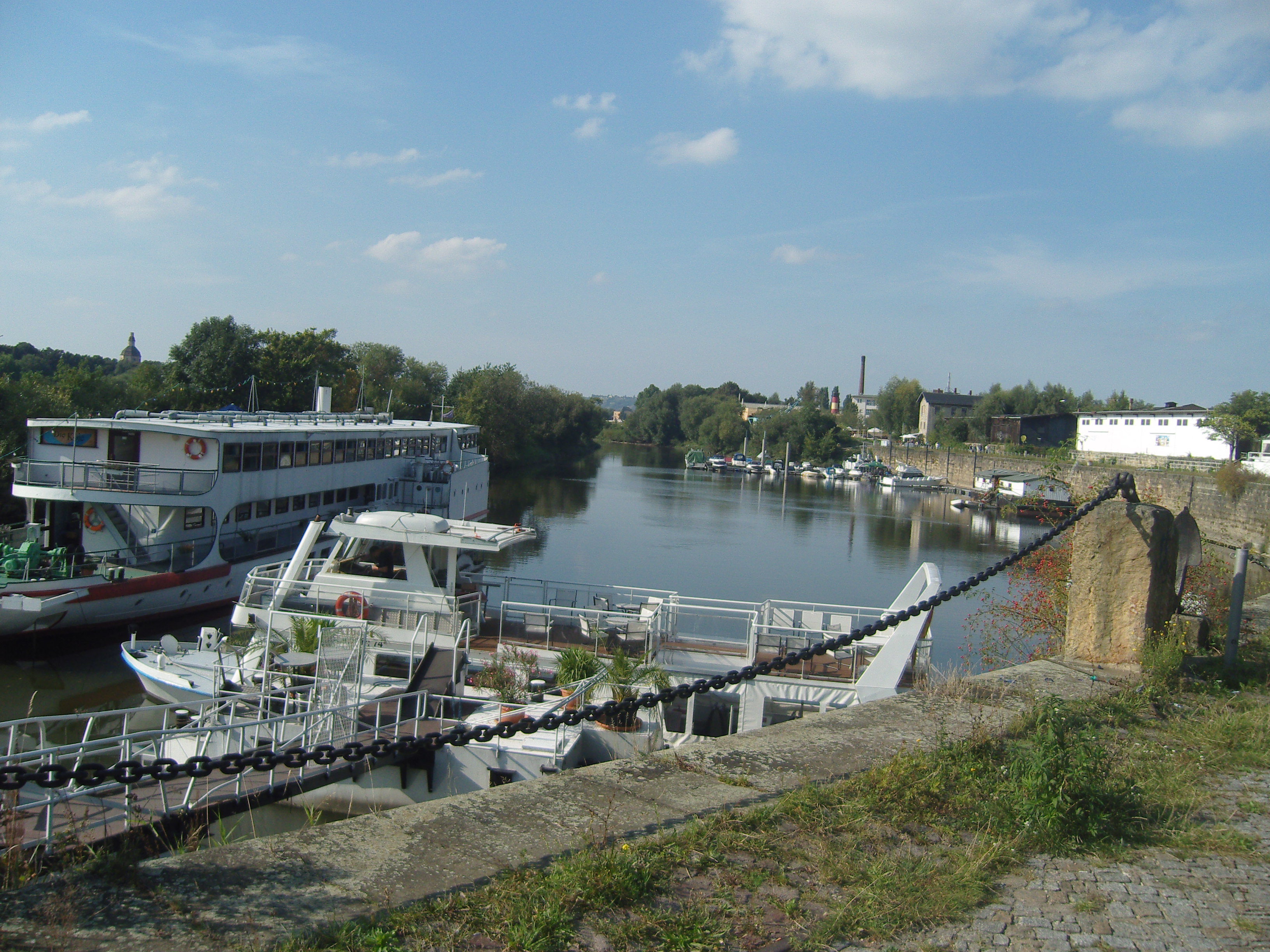 Denkmalgeschützter Neustädter Hafen in Dresden